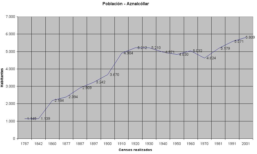 Gráfico evolución histórica de los habitantes en Aznalcóllar en Sevilla